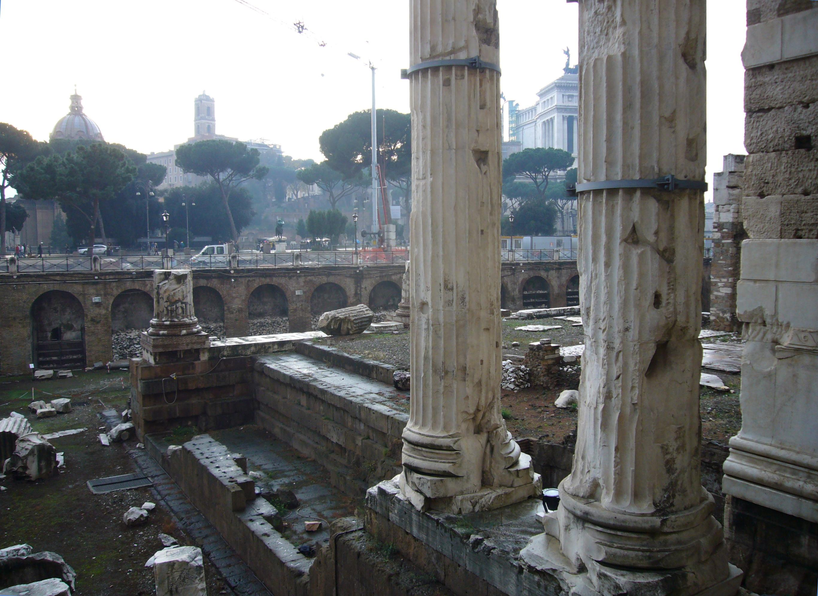 Roma, Tempio di Marte Ultore e Foro di Augusto verso il Campidoglio